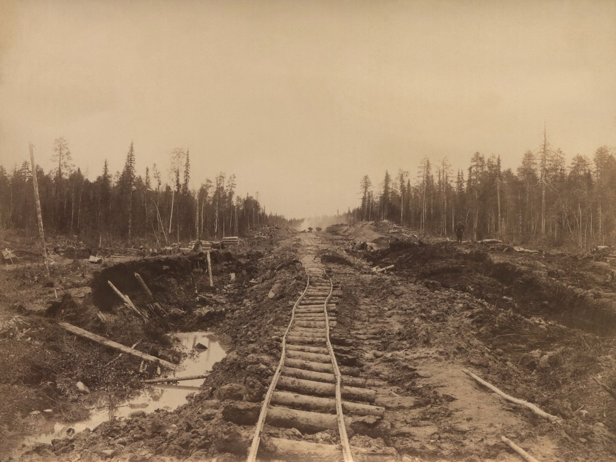 Осадка полотна на болоте при производстве работ на 542 версте, автор фото Майер П. Ю, 1896 год